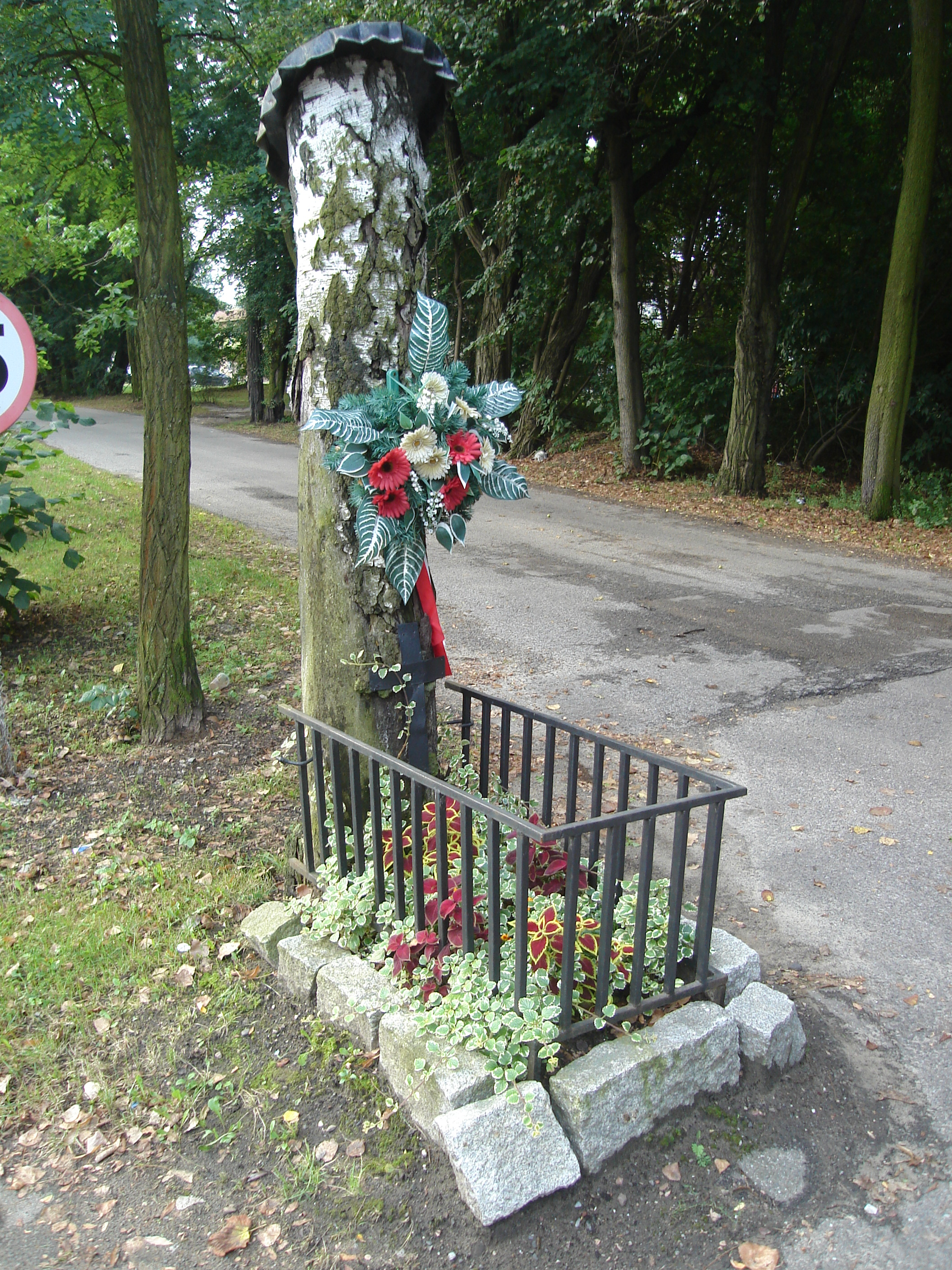 Kapliczka na rogu ulic Kabaretowej i Palisadowej